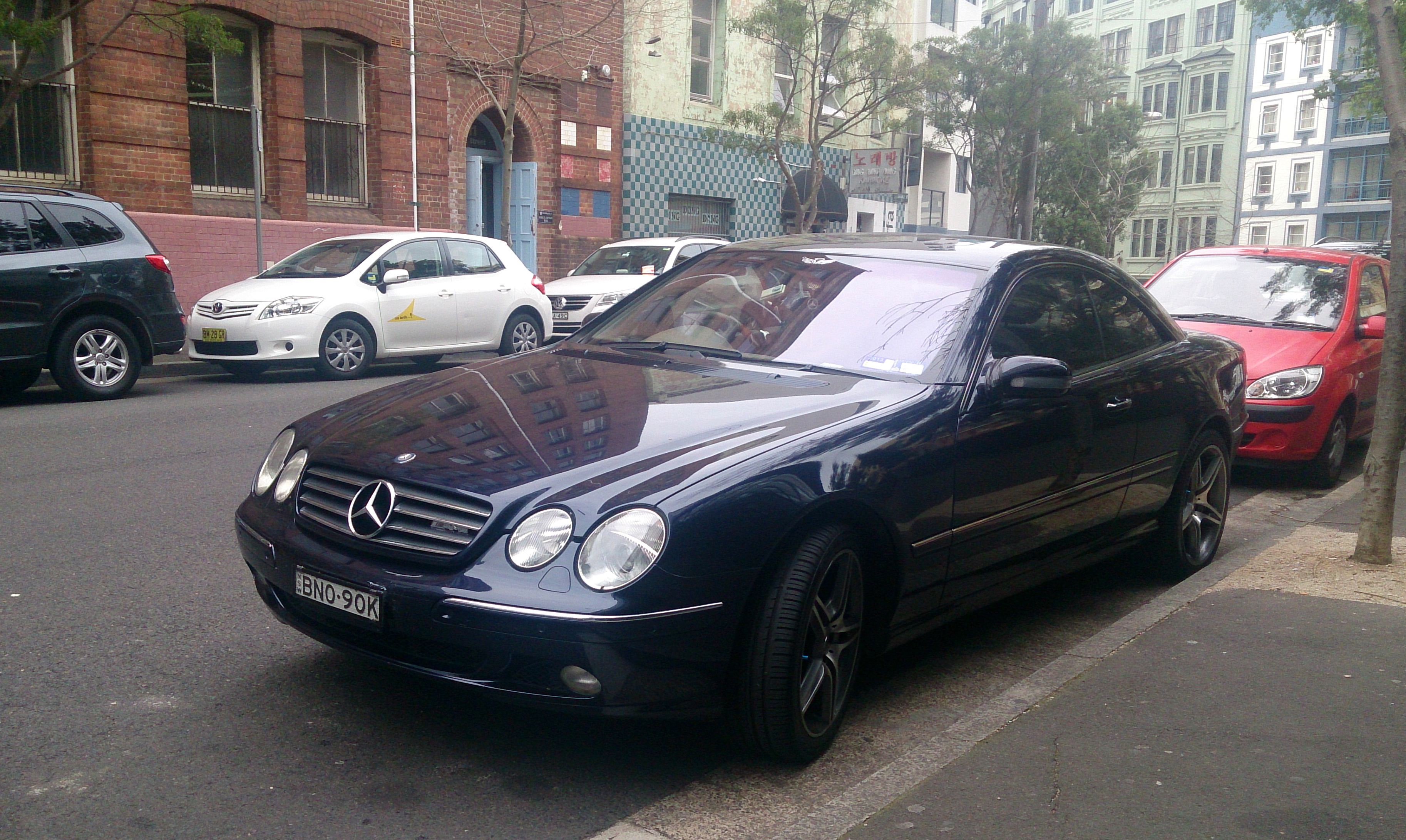 Mercedes-Benz CL500